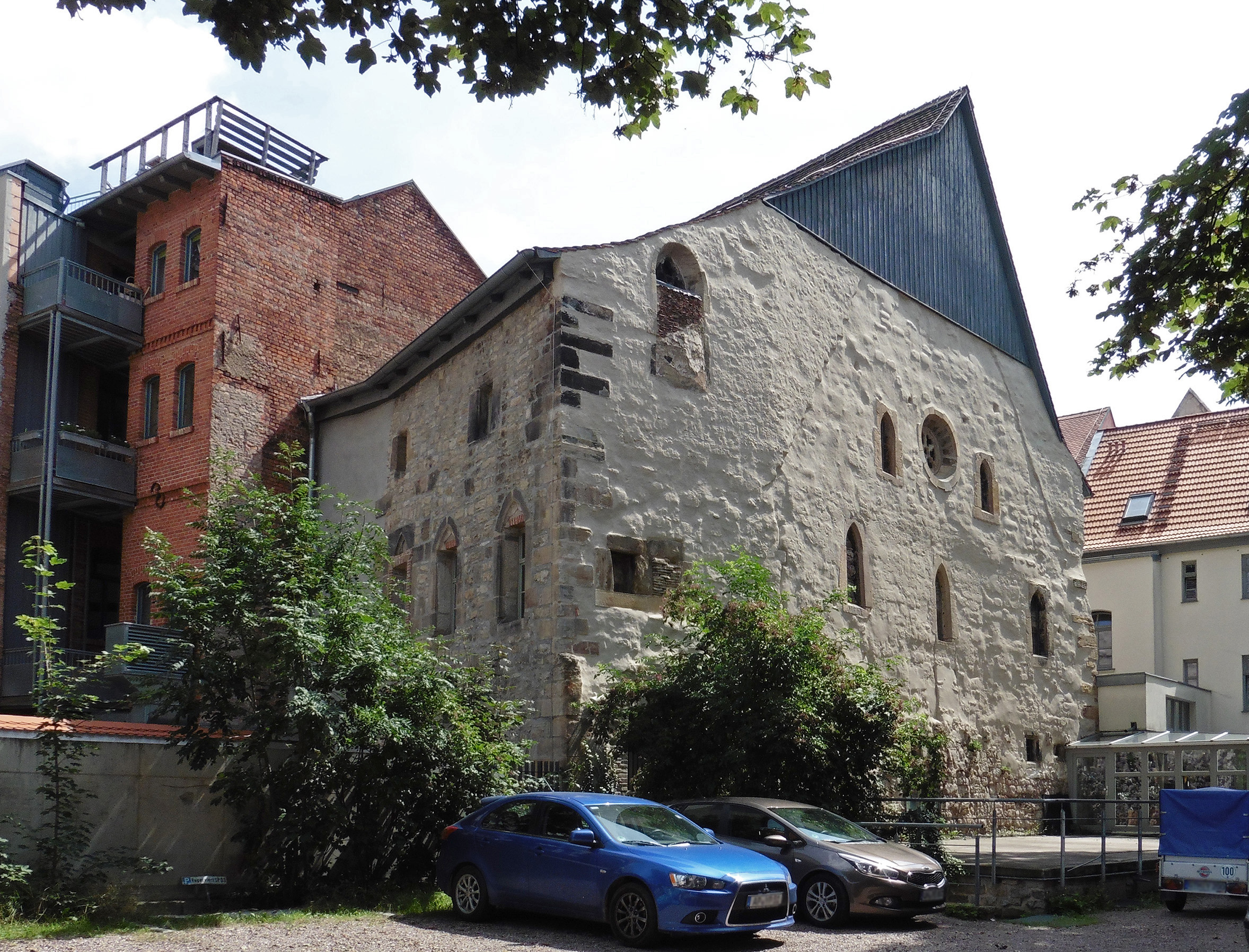 Alte Synagoge in der Waagegasse 8 in der Altstadt von Erfurt. Ansicht von Westen. Erbaut um 1100 und bis zum Pogrom von 1349 Synagoge der jüdischen Gemeinde. Danach als Lagerhaus und in der 2. Hälfte des 19. Jahrhunderts gastronomisch genutzt. Heute Ausstellungsraum zur Kultur und Geschichte der jüdischen Gemeinde Erfurts im Mittelalter.